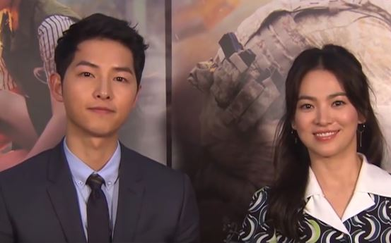 "태양의후예" 드라맥스 ID영상 - 송중기&송혜교